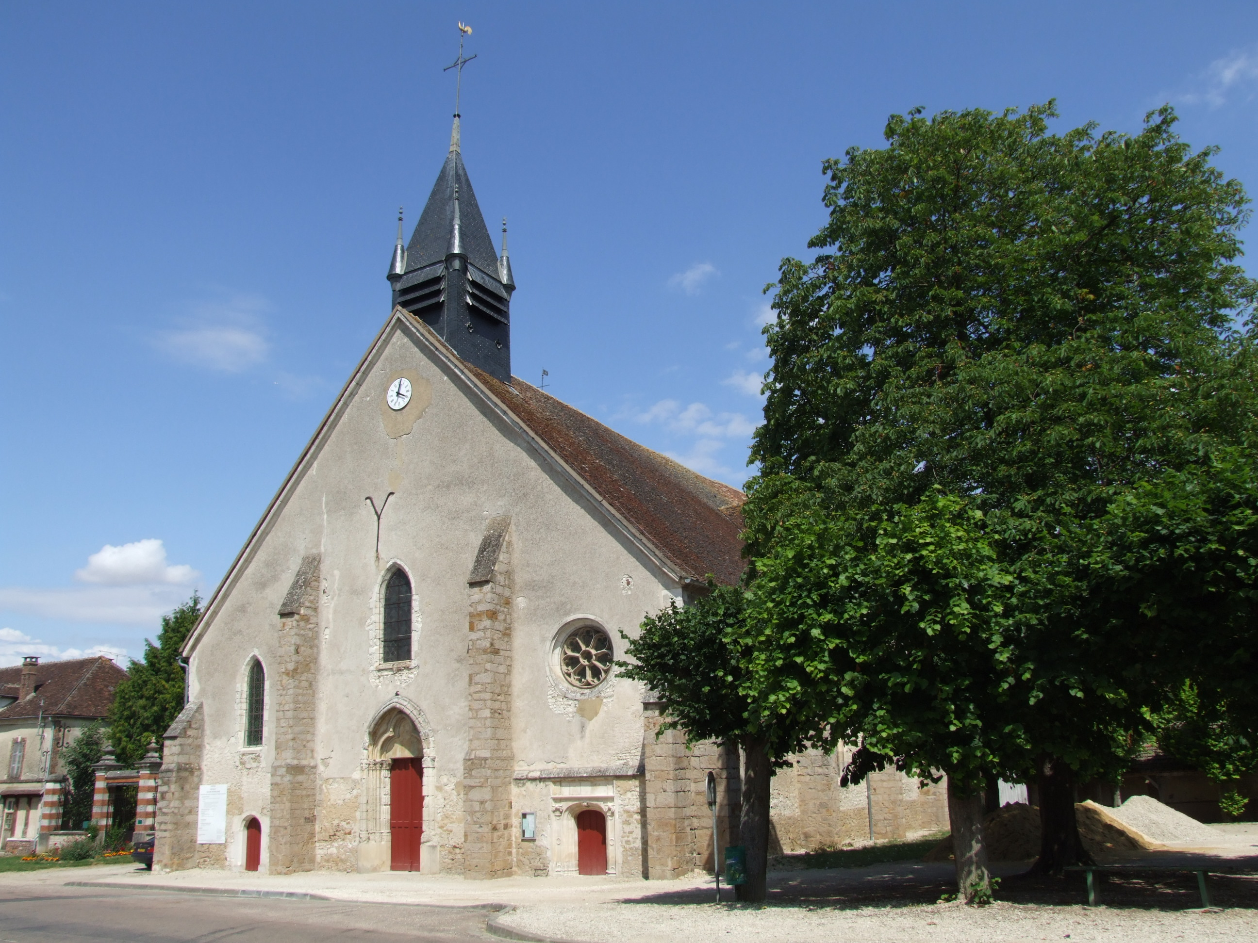 Eglise de l'Assomption, Neuilly, Yonne, Bourgogne, FRANCE